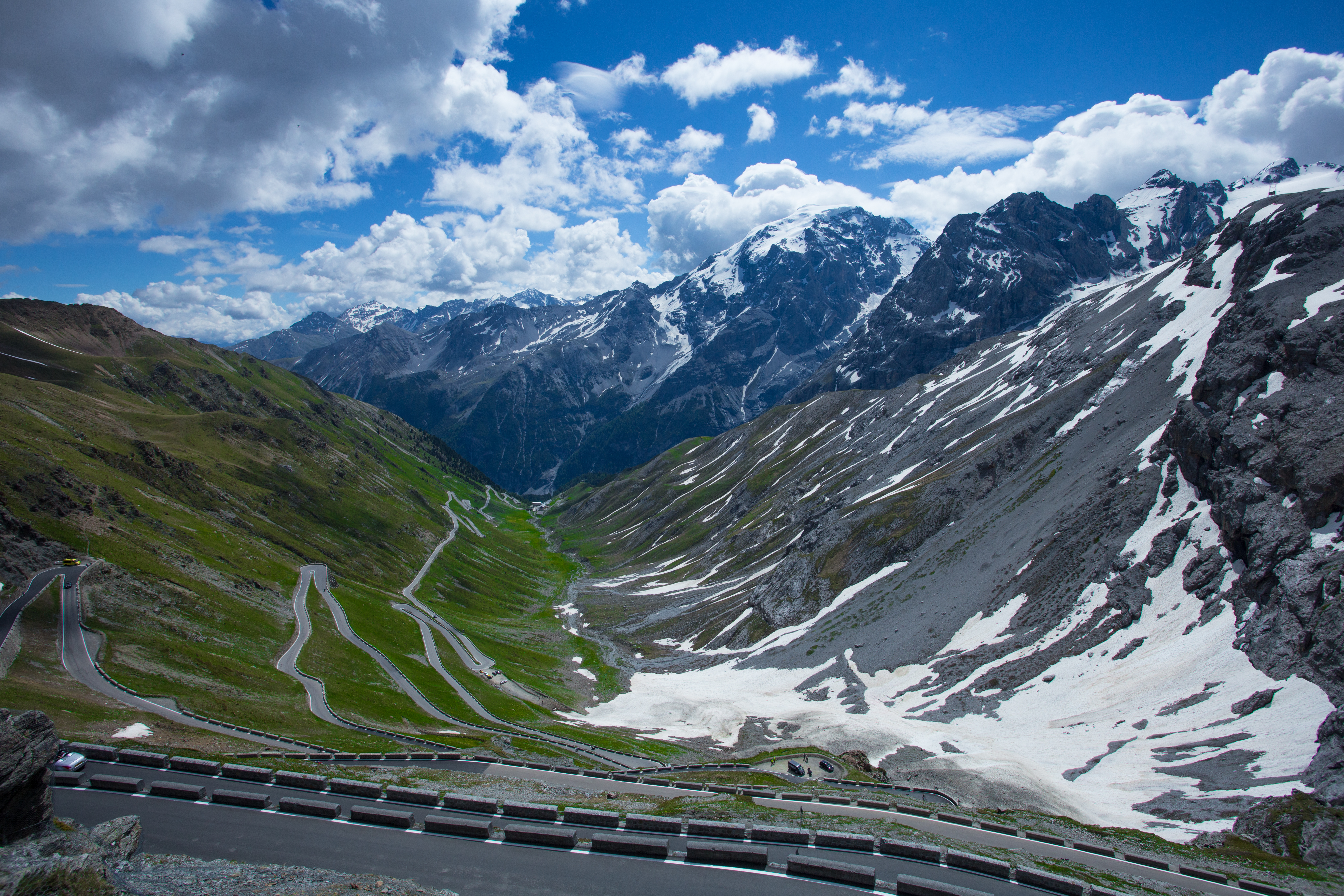 Il Passo dello Stelvio fotografato da un tornante direzione Alto Adige